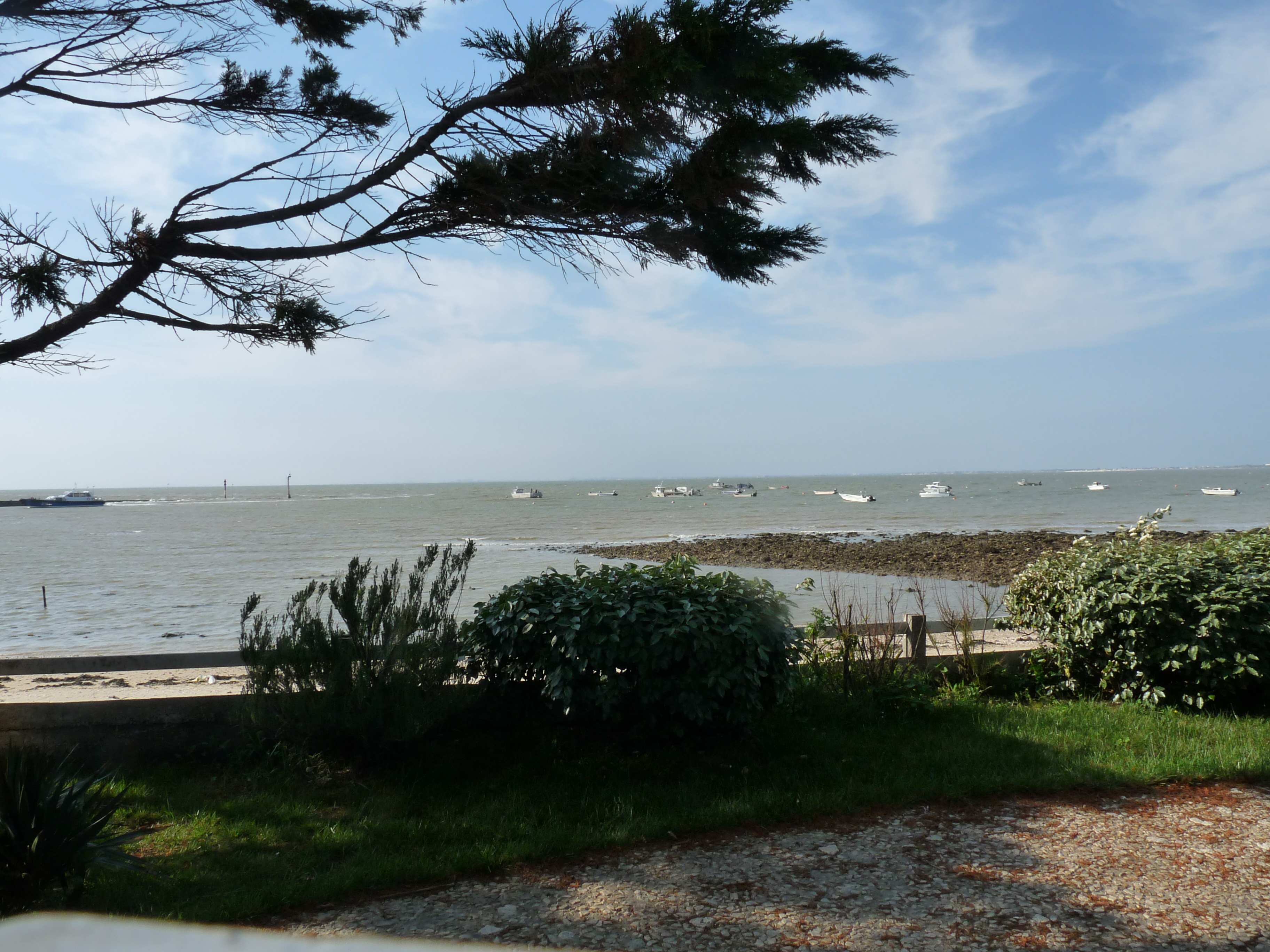 Pointe de la Fumée (Charente-Maritime), côté nord